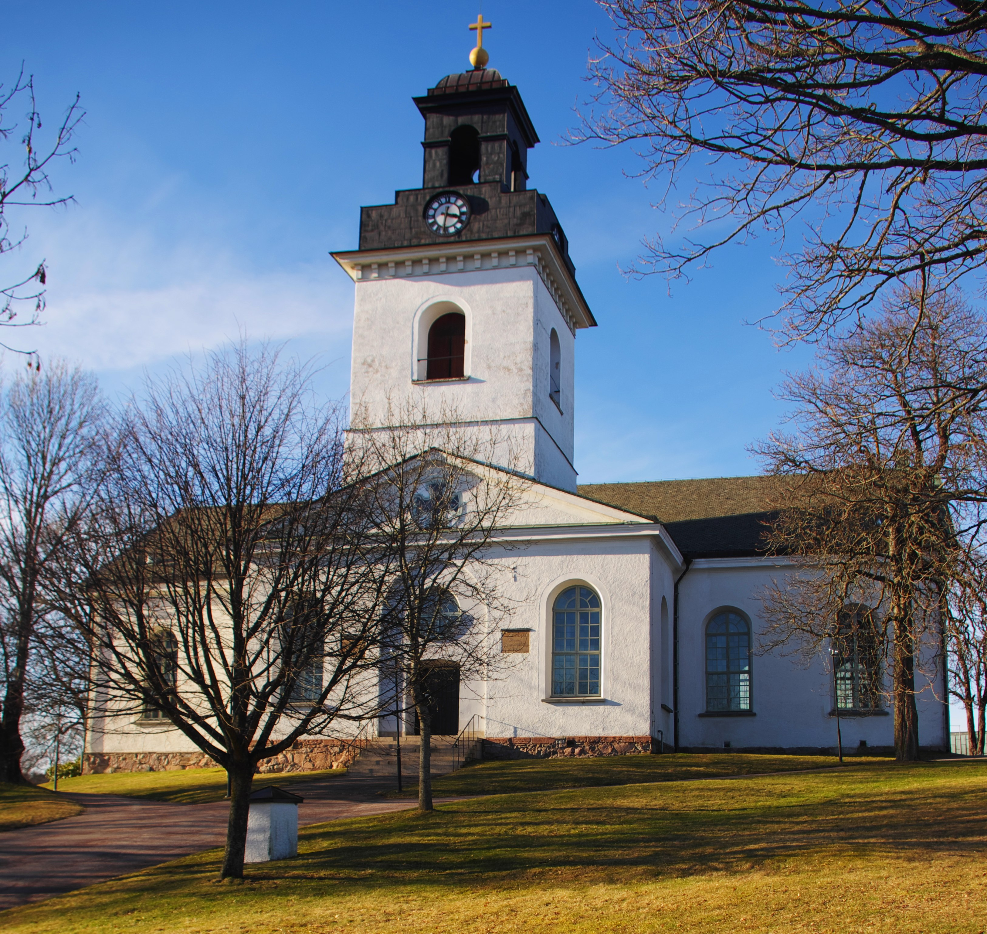 Åmåls kyrka i Åmål i Åmåls kommun i Sverige.